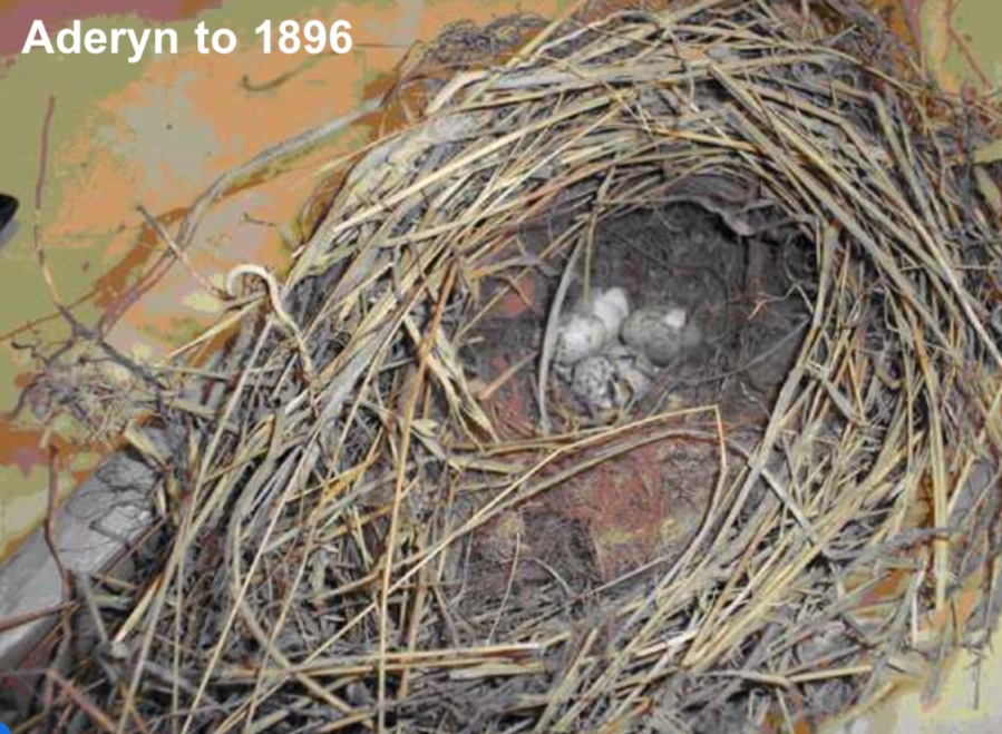 Nyth aderyn y to wedi ei ddyddio o 1896, yn Llanfaglan, Caernarfon 2012